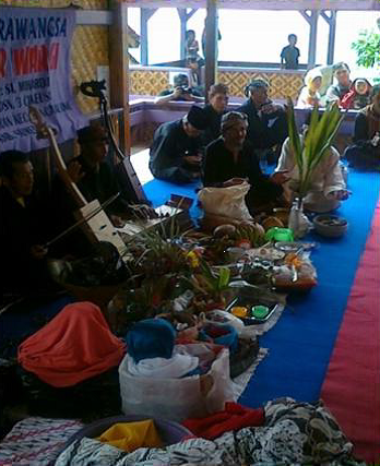 Tarawangsa